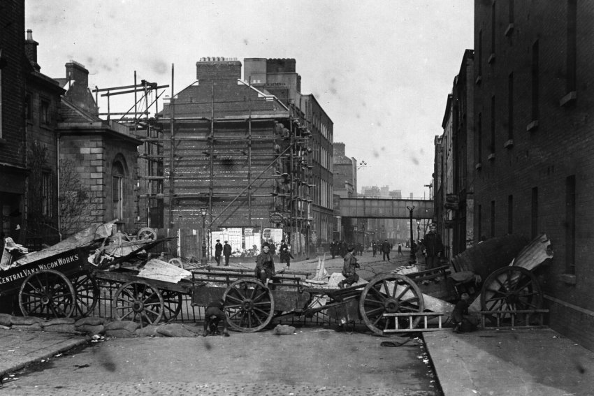 Dublin im April 1916 - Osteraufstand - Straßenbarrikade